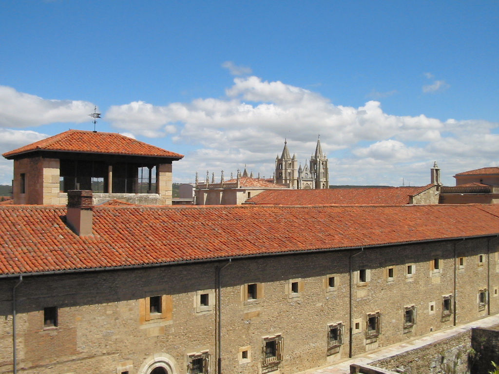 León, España. En primer término, Colegiata de San Isidoro. Al fondo, Catedral.